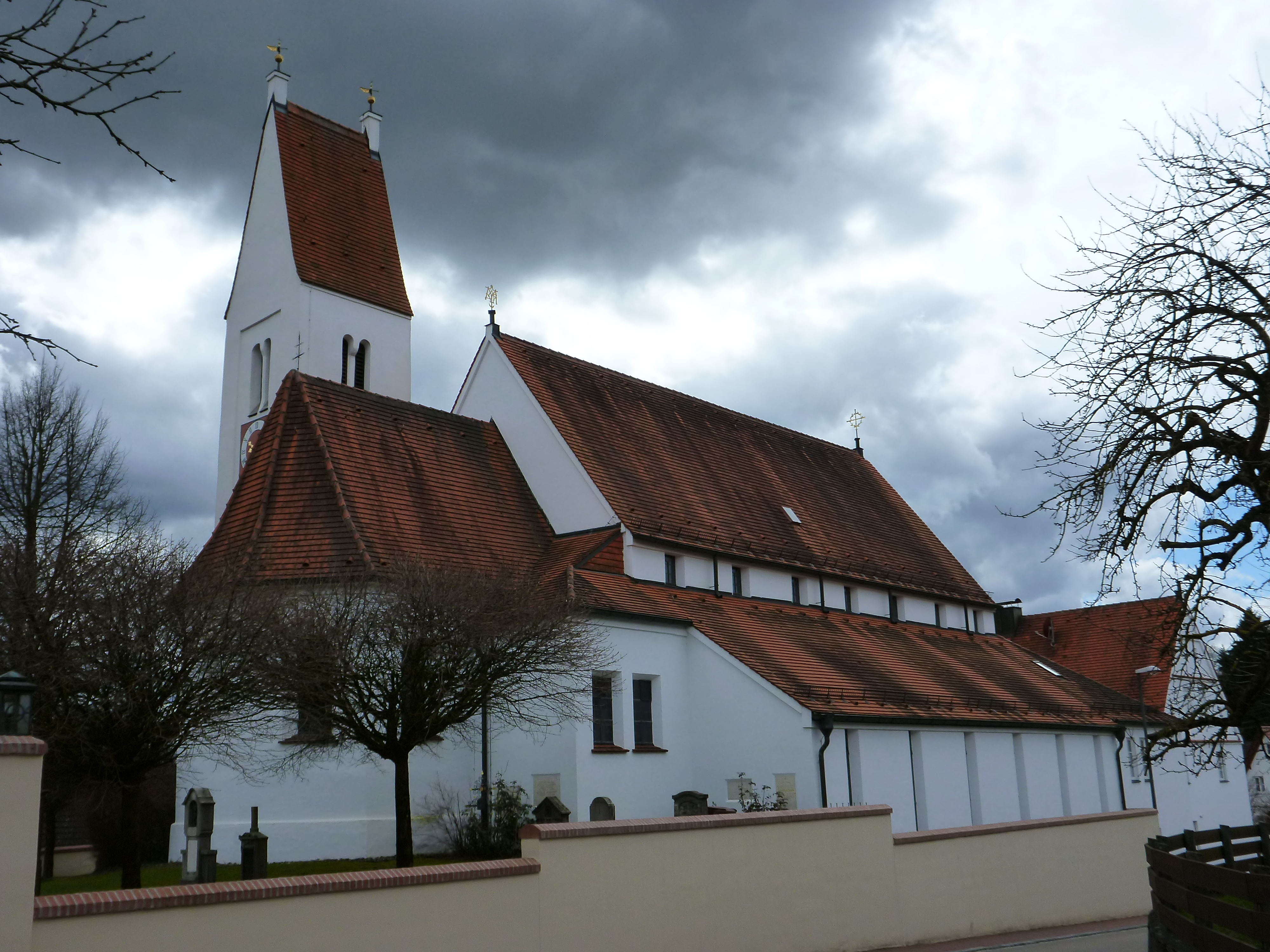 Pfarrkirche St. Stephan Bonstetten, Turm und Chor um 1500, Langhaus 1982 neu erbaut; mit Ausstattung.